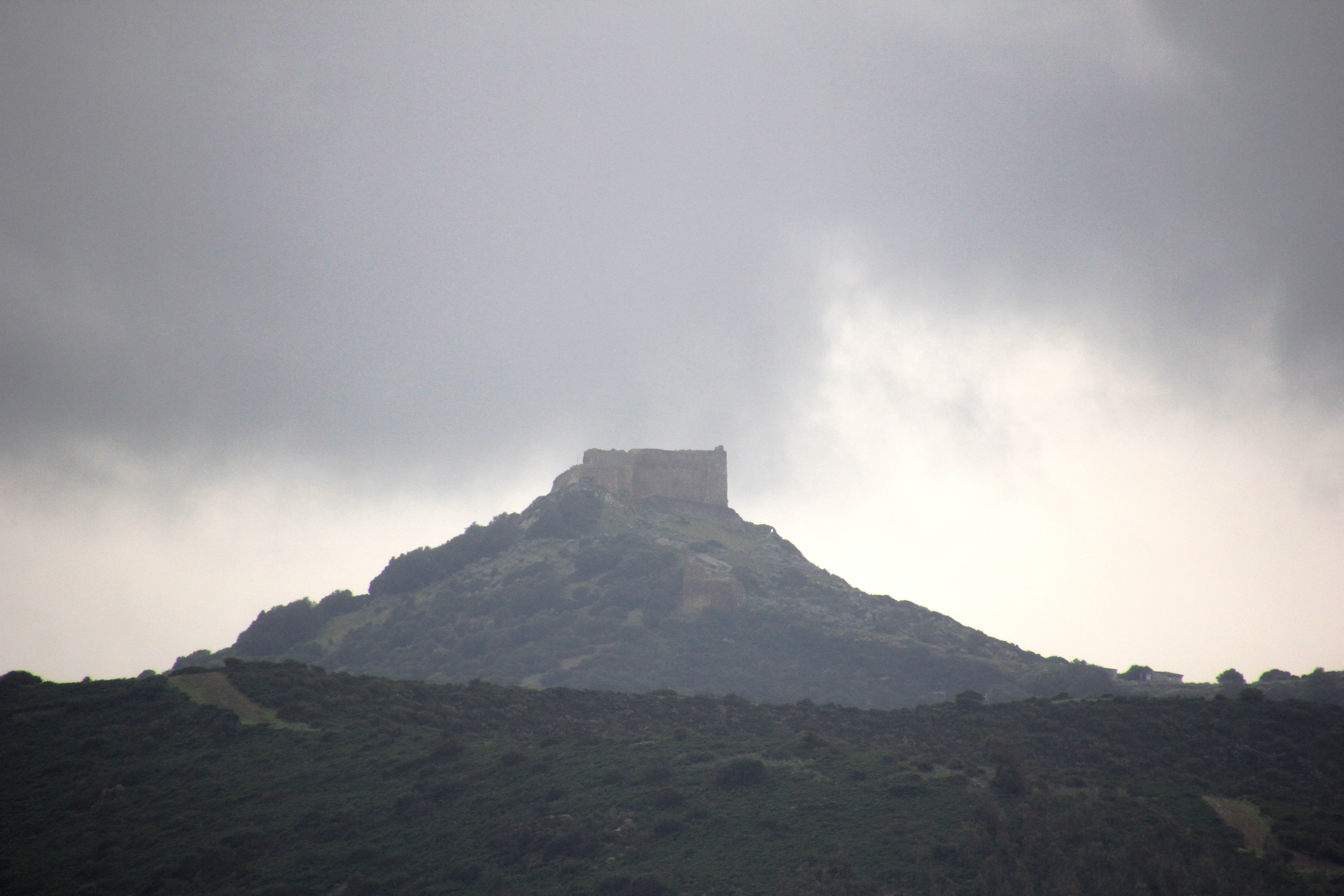 Sardara - Castello di Monreale